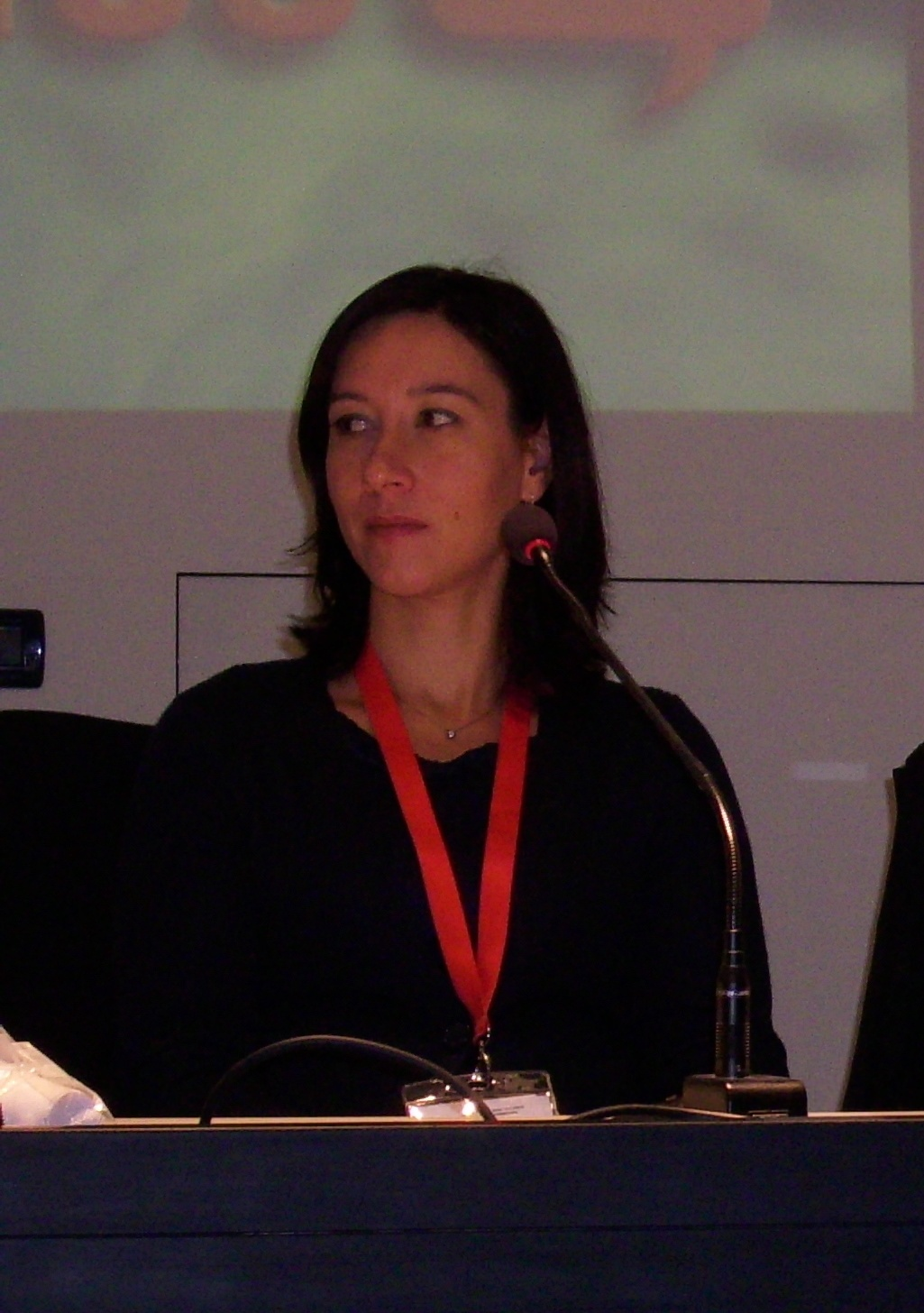 Lucca Comics&Games 2010 - Incontro con lo staff del fumetto della Sergio Bonelli Editore Graystorm, la disegnatrice Anna Lazzarini. → This file has been extracted from another image: File:Lucca Comics 2010 - Incontro Bonelli Greystorm 06.jpg.